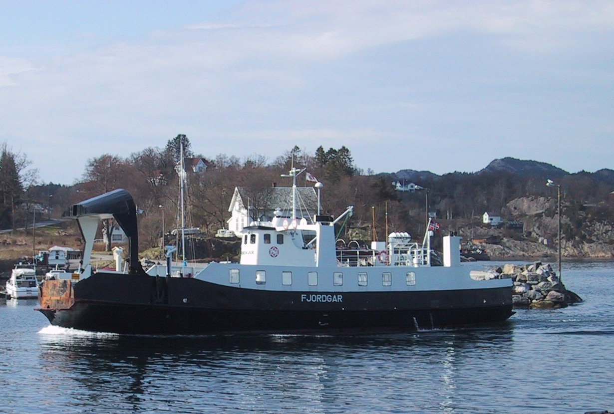 M/F Fjordgar, built 1967.